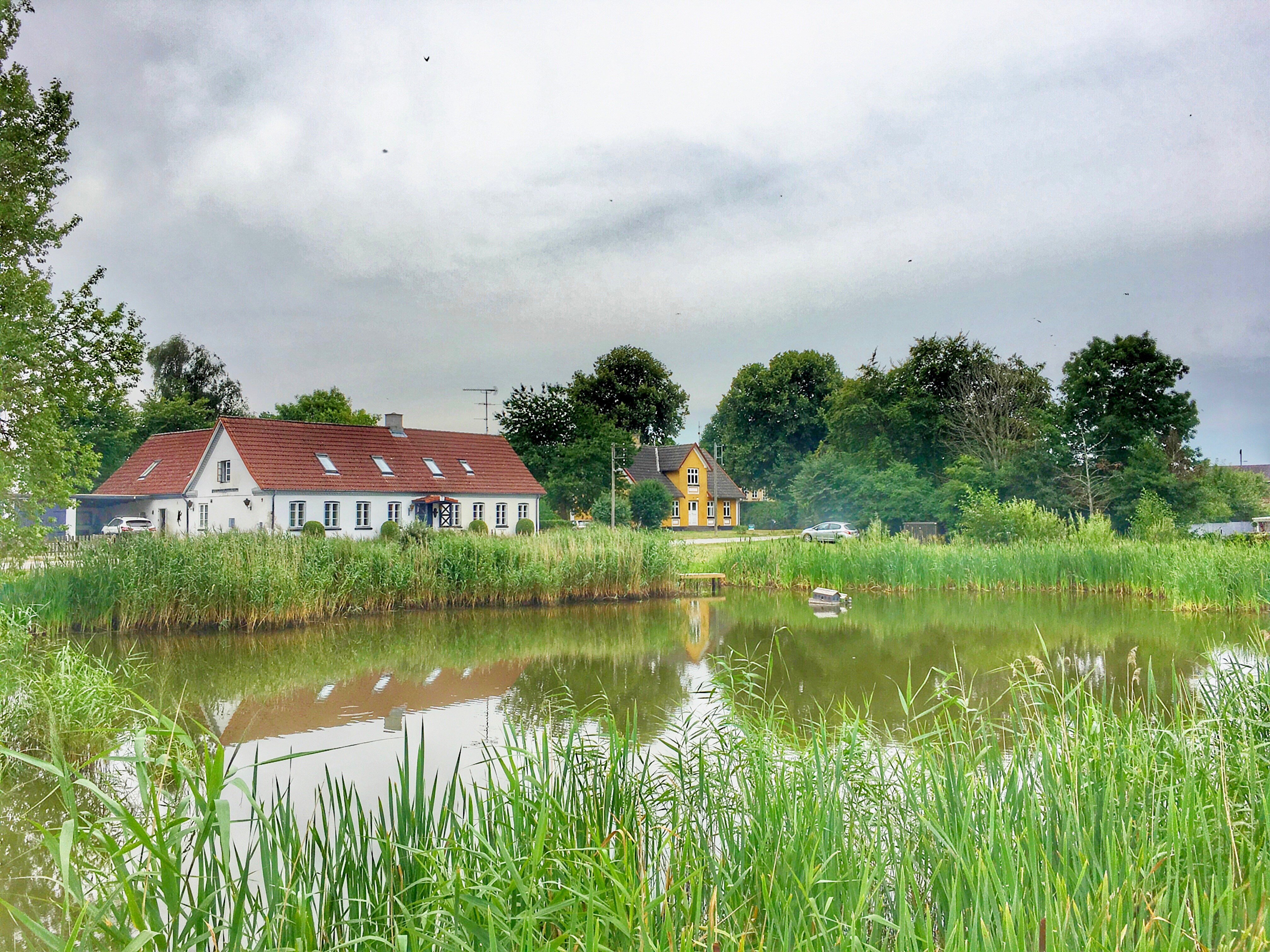 Gadekær i Vellerup, Hornsherred, Sjælland